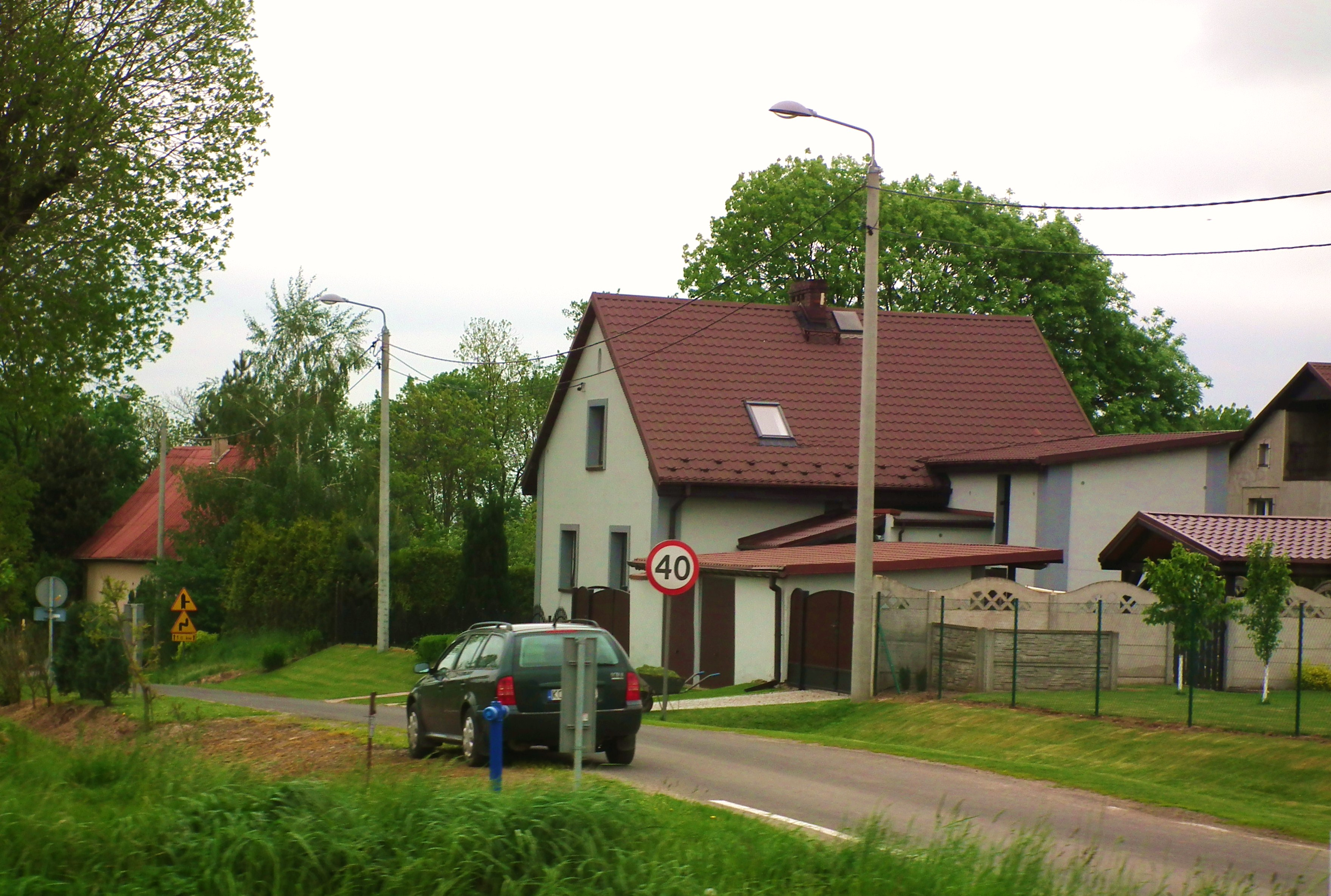 Gródczanki - fragment wsi.